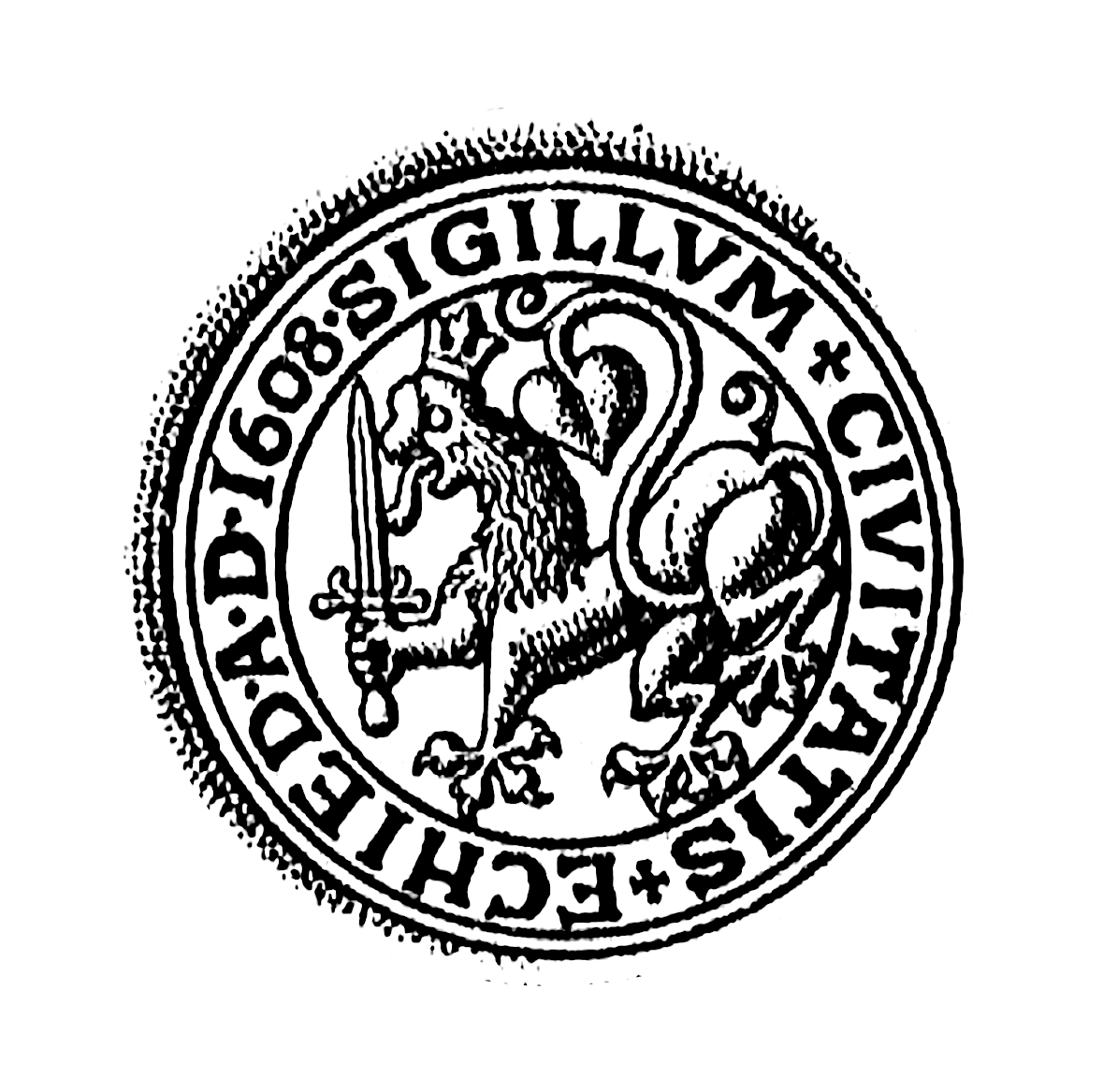 SIGILLUM CIVITATIS ECHIED AD 1608 Ecsed város ezüst pecsétje 1608-ból, amikor Báthory Gábor Ecsed szabadalomlevelét kibocsátotta